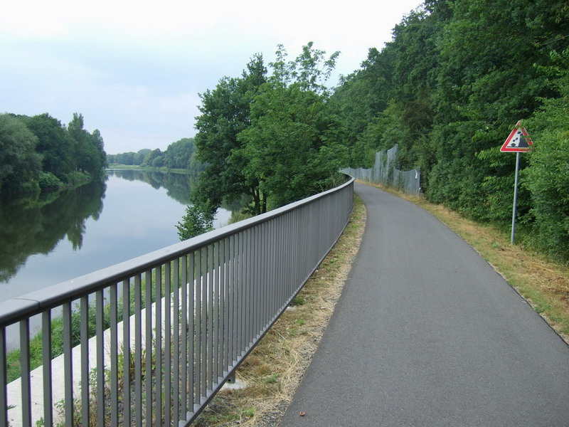 Muldental-Bahnradweg (Grimma-Wurzen)